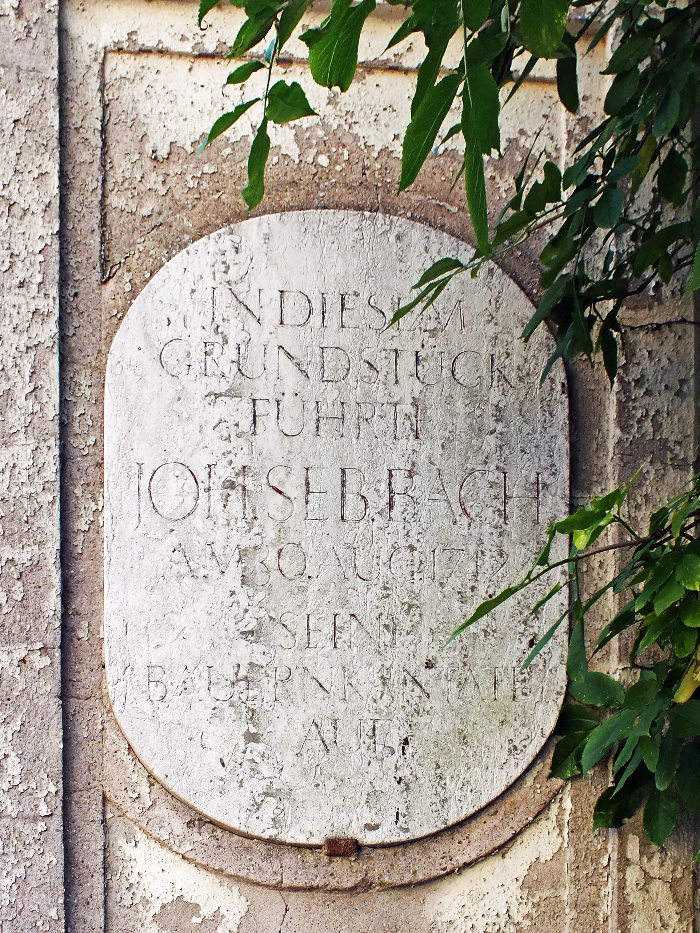 Tafel an der Torsäule zum ehemaligen Schloss Kleinzschocher zur Erinnerung an die Uraufführung von Bachs Bauerkantate Text der Tafel: "In diesem Grundstück führte Joh. Seb. Bach am 30. August 1742 seine Bauernkantate auf"